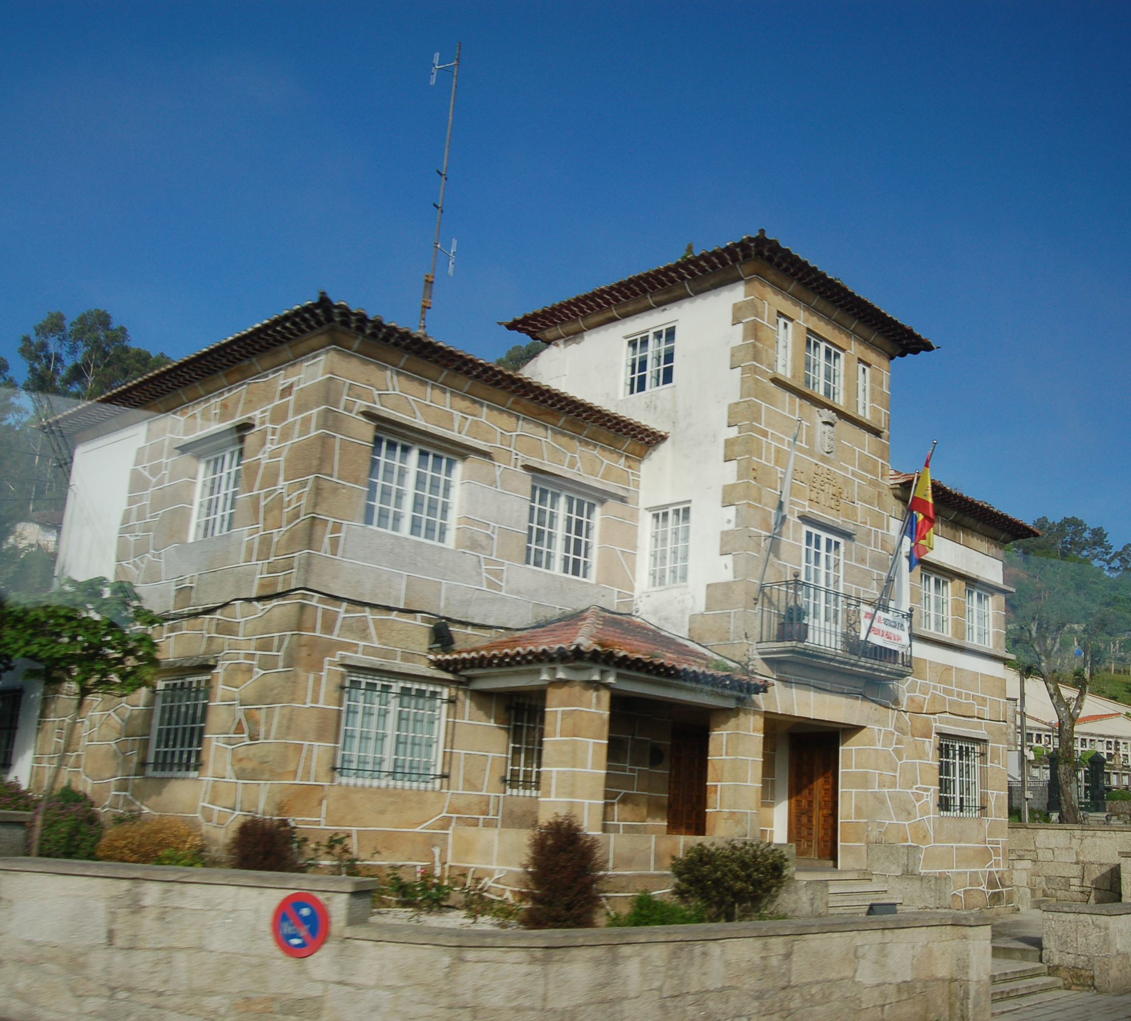 Casa consistorial de Mos